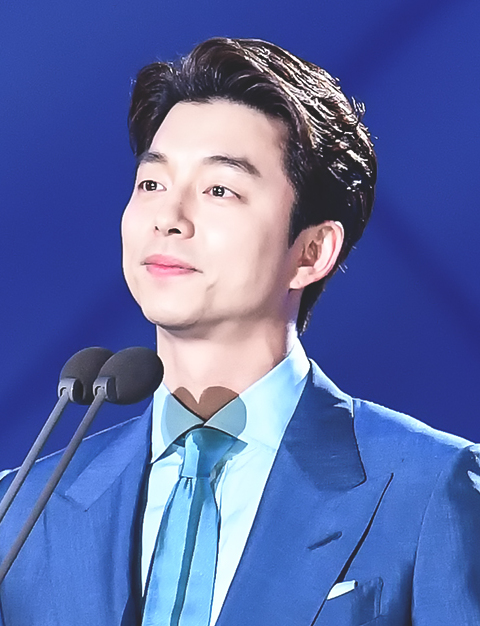 180503 54회 백상예술대상